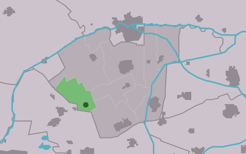 Kaartsje fan himrik fan Readtsjerk